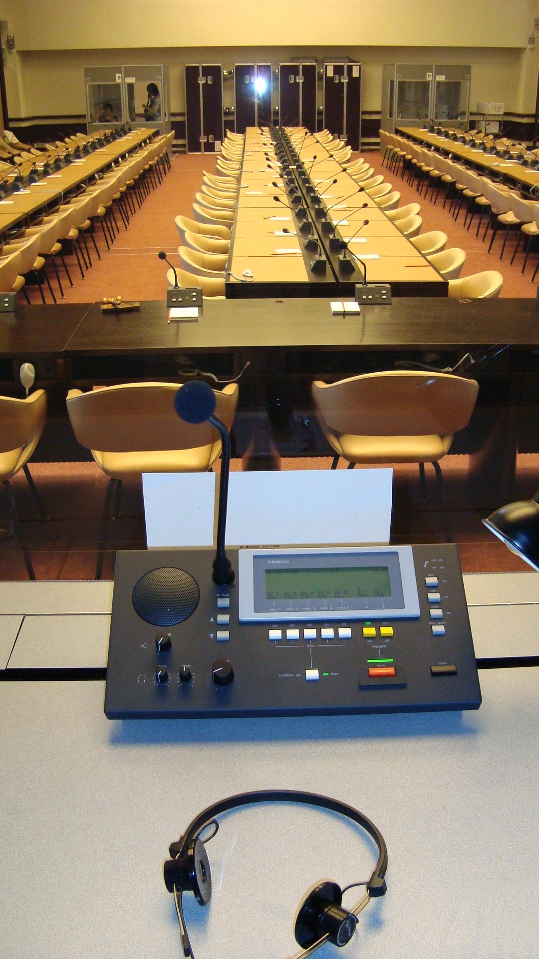 Salle de réunion vue de la cabine d'interprétation